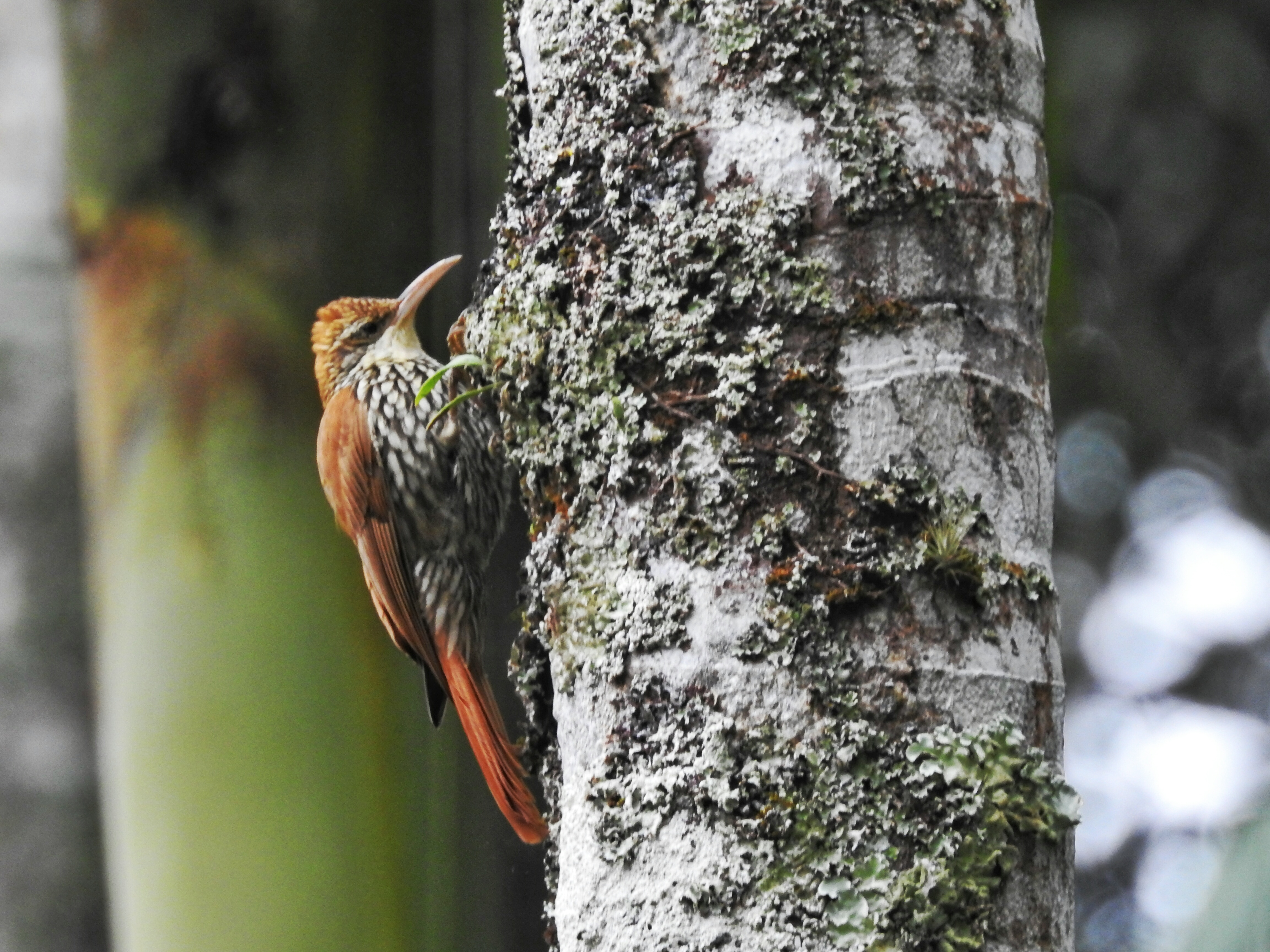 Arapaçu-escamado, ave fotografada no Recanto das Cigarras, Universidade Federal de Viçosa, Campus Viçosa, Minas Gerais.